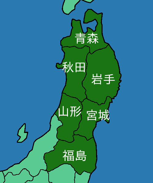 東北地方の自治体